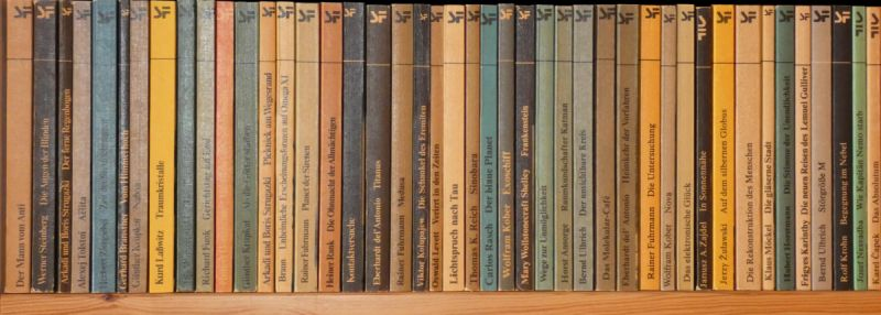 44 teilige Buchreihe "SF Utopia" aus dem Verlag "Das Neue Berlin" von 1980 bis 1990